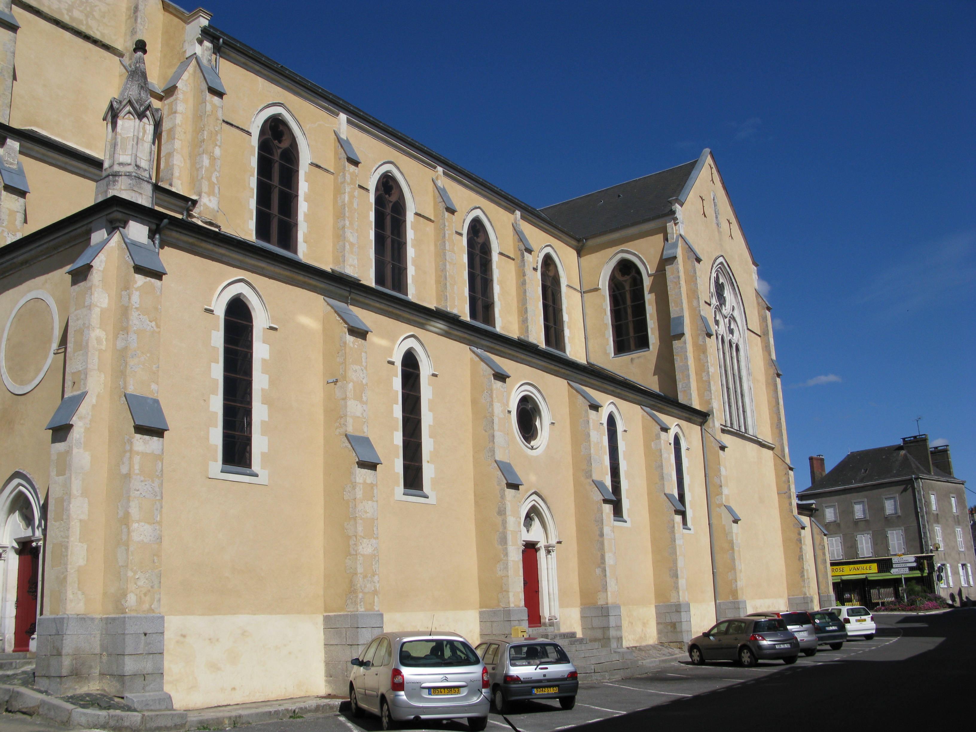 Église d'Andouillé